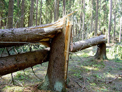 Windbruch von Fichten Copyright Status: GNU Freie Dokumentationslizenz